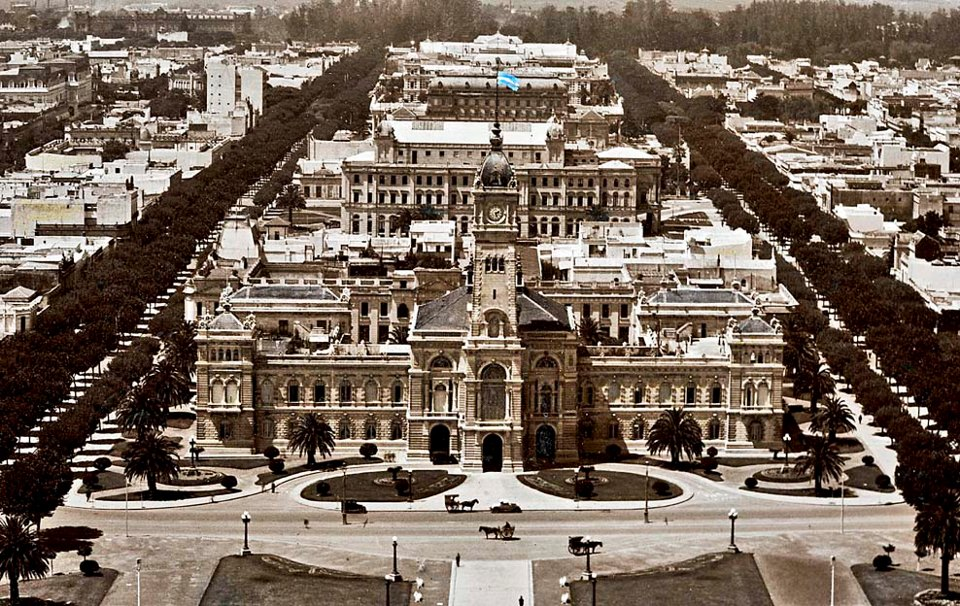 Palacio Municipal de La Plata y otros edificios del Eje Fundacional de la ciudad (Teatro Argentino, Palacio de la Legislatura, Casa de Gobierno) flanqueados por las Avenidas 51 y 52 con sus arboledas. Cincuentenario de la Ciudad (1932).